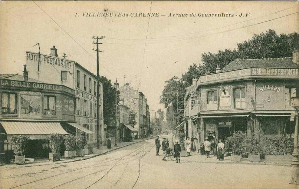 Villeneuve-la-Garenne, l'avenue de Gennevilliers (Aujourd'hui avenue de Verdun)